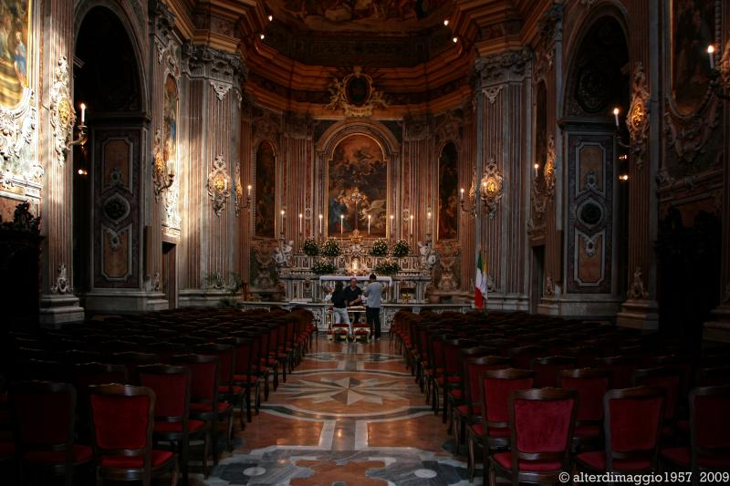 Chiesa della Nunziatella (Napoli)